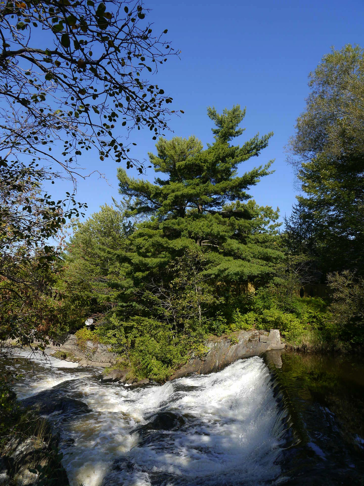 Cascades de la rivière Nicolet, Parc Marie-Victorin, Kingsey Falls, Québec.